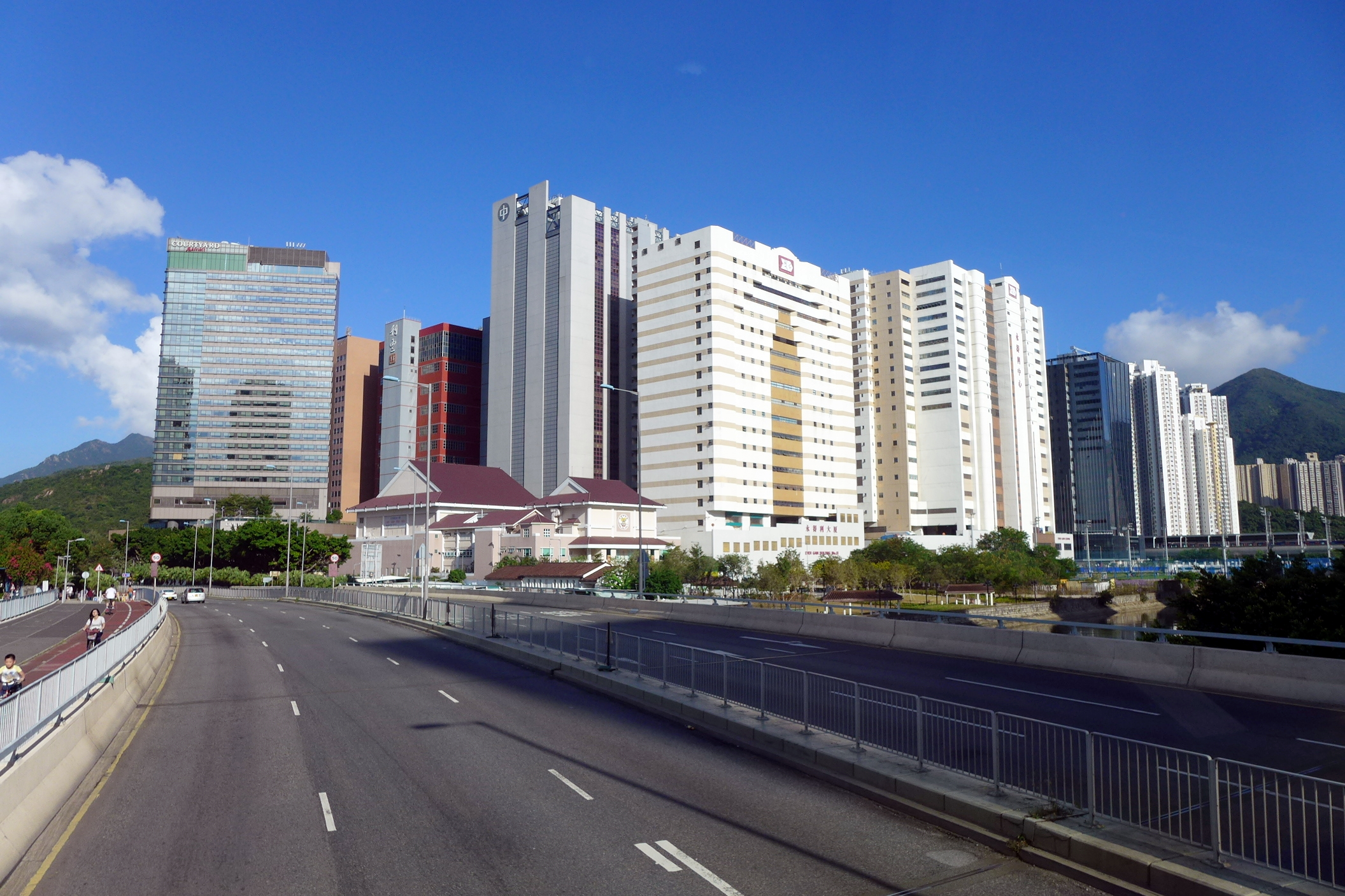 Shek Mun